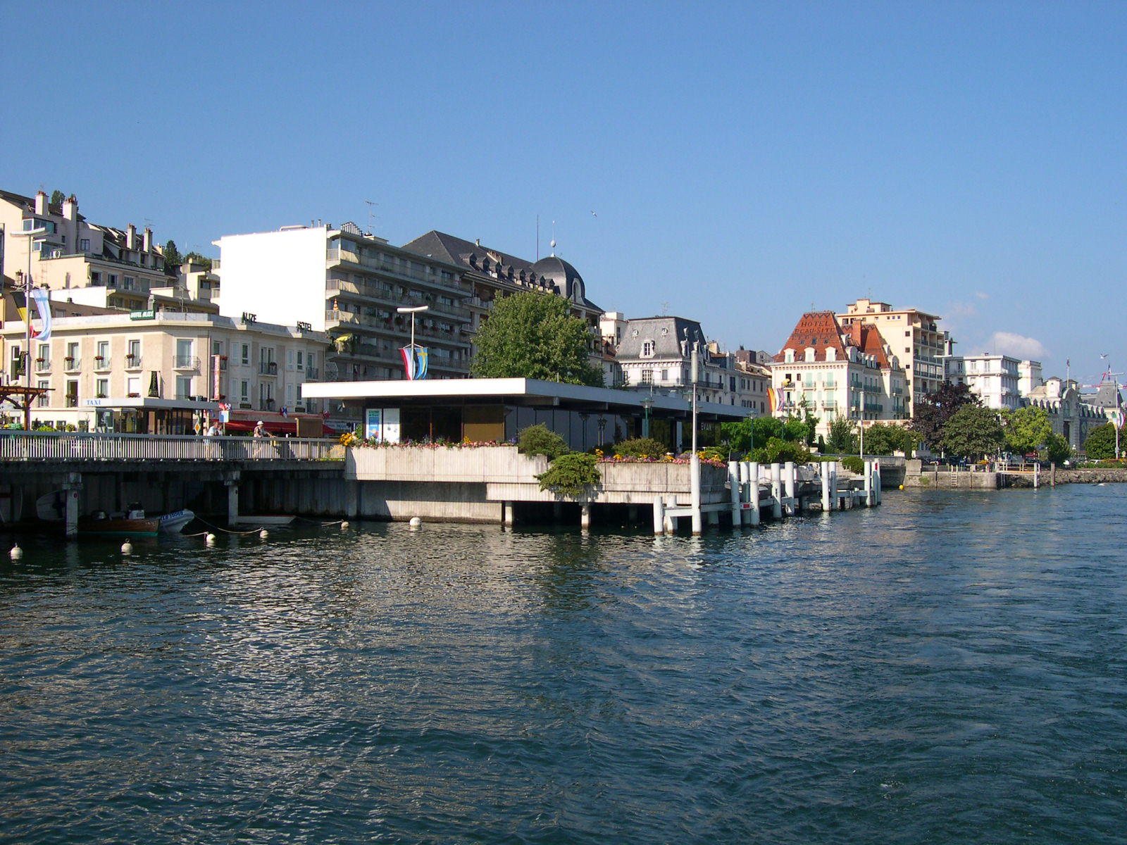 Bâtiment de la CGN d'Évian vu du lac Léman.